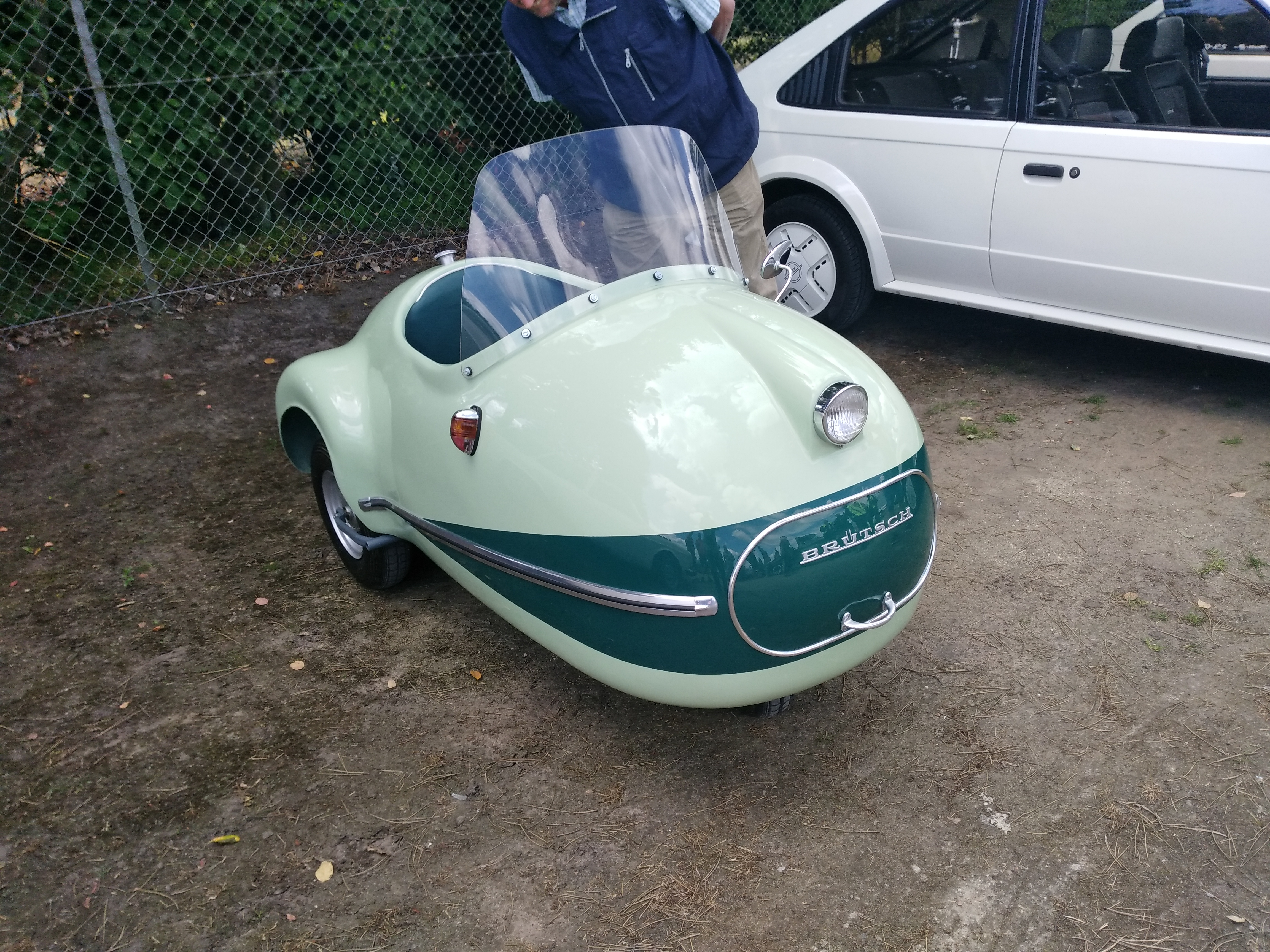 Haselünne Classics & Burgers 05.06.2017